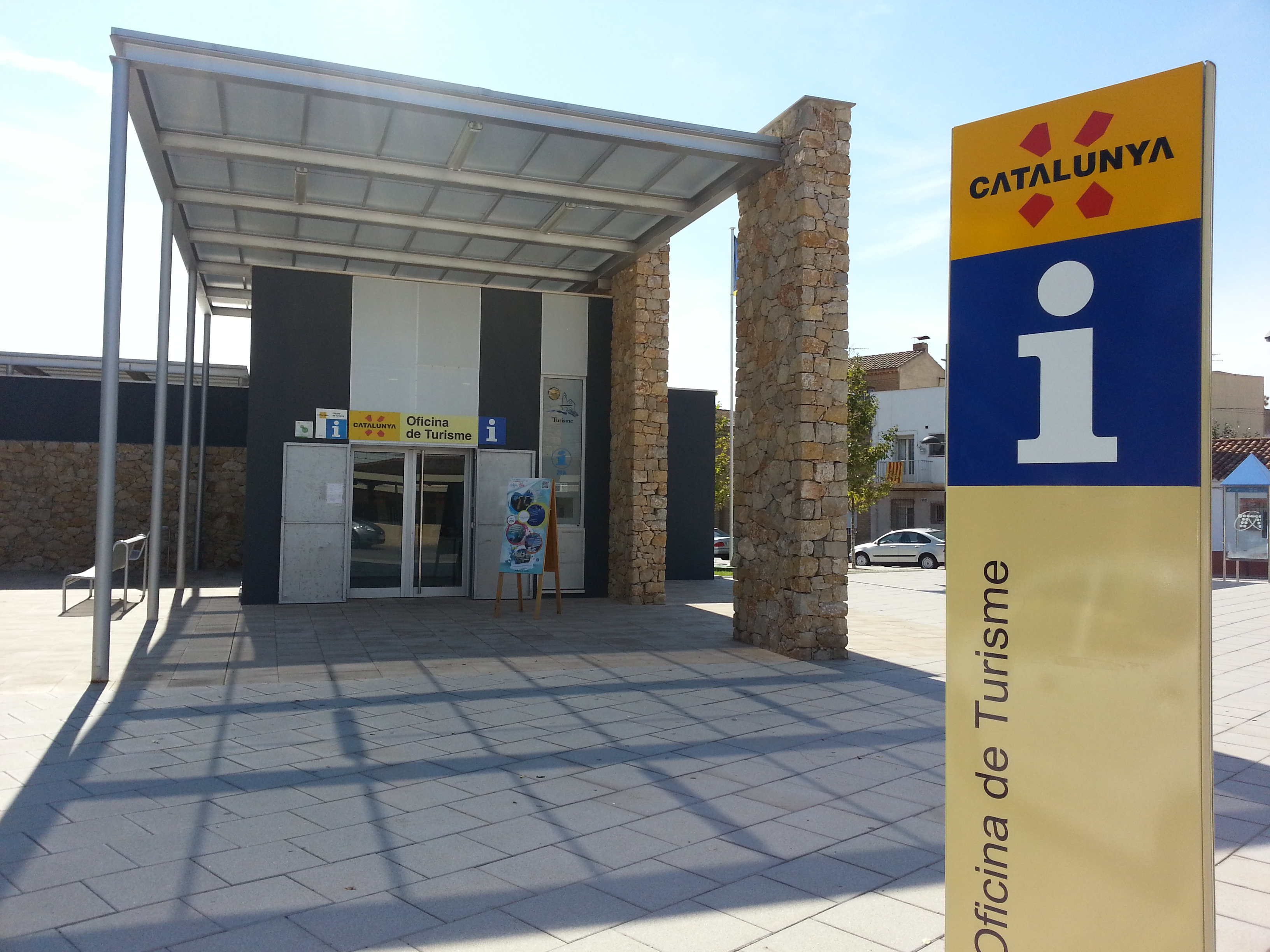 Foto exterior de l'Oficina Municipal de Turisme de l'Ametlla de Mar.